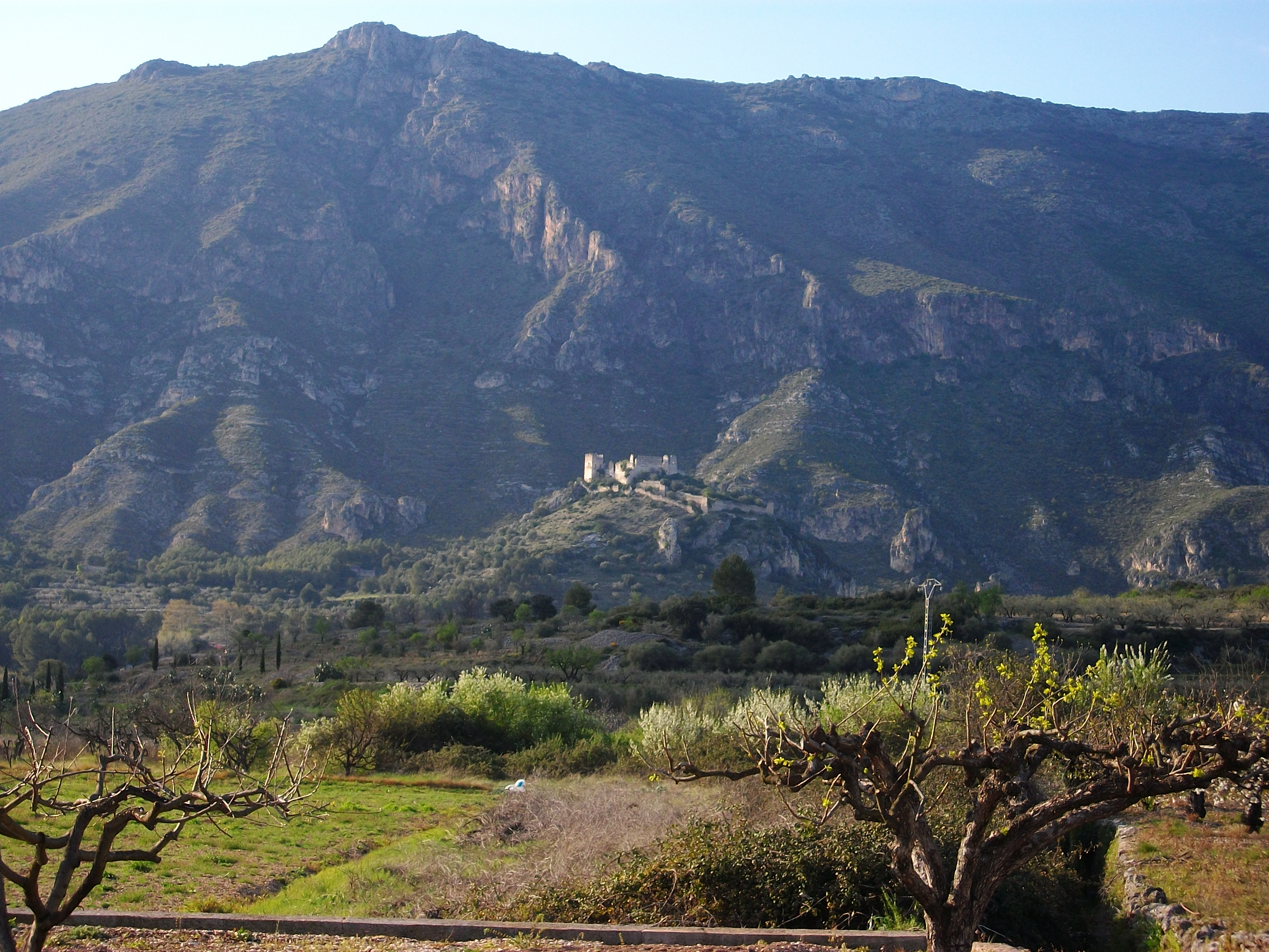 Castell de Perputxent a la llunyania, l'Orxa.